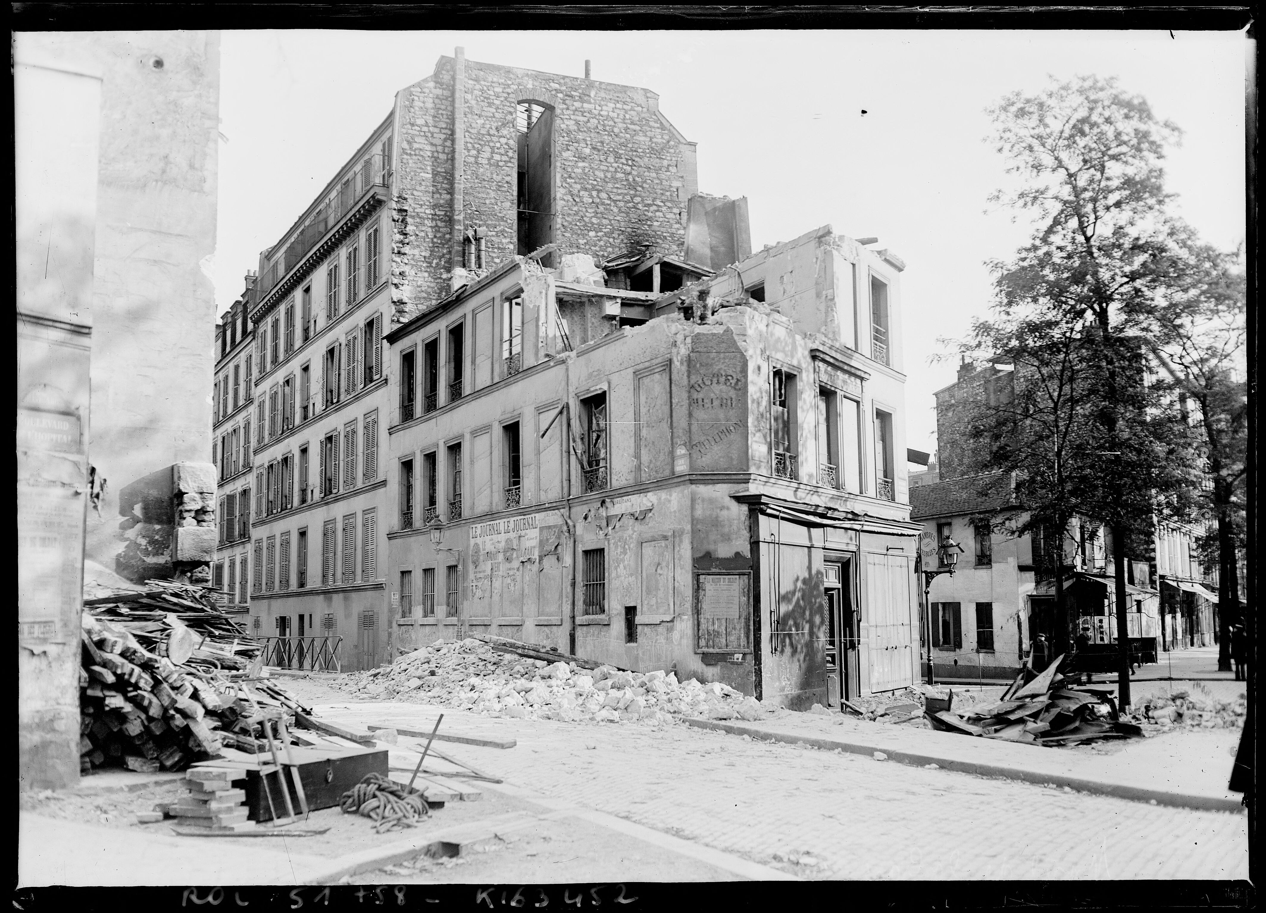 Le boulevard de la Gare (boulevard Vincent-Auriol) après le bombardement du 2 juin 1918